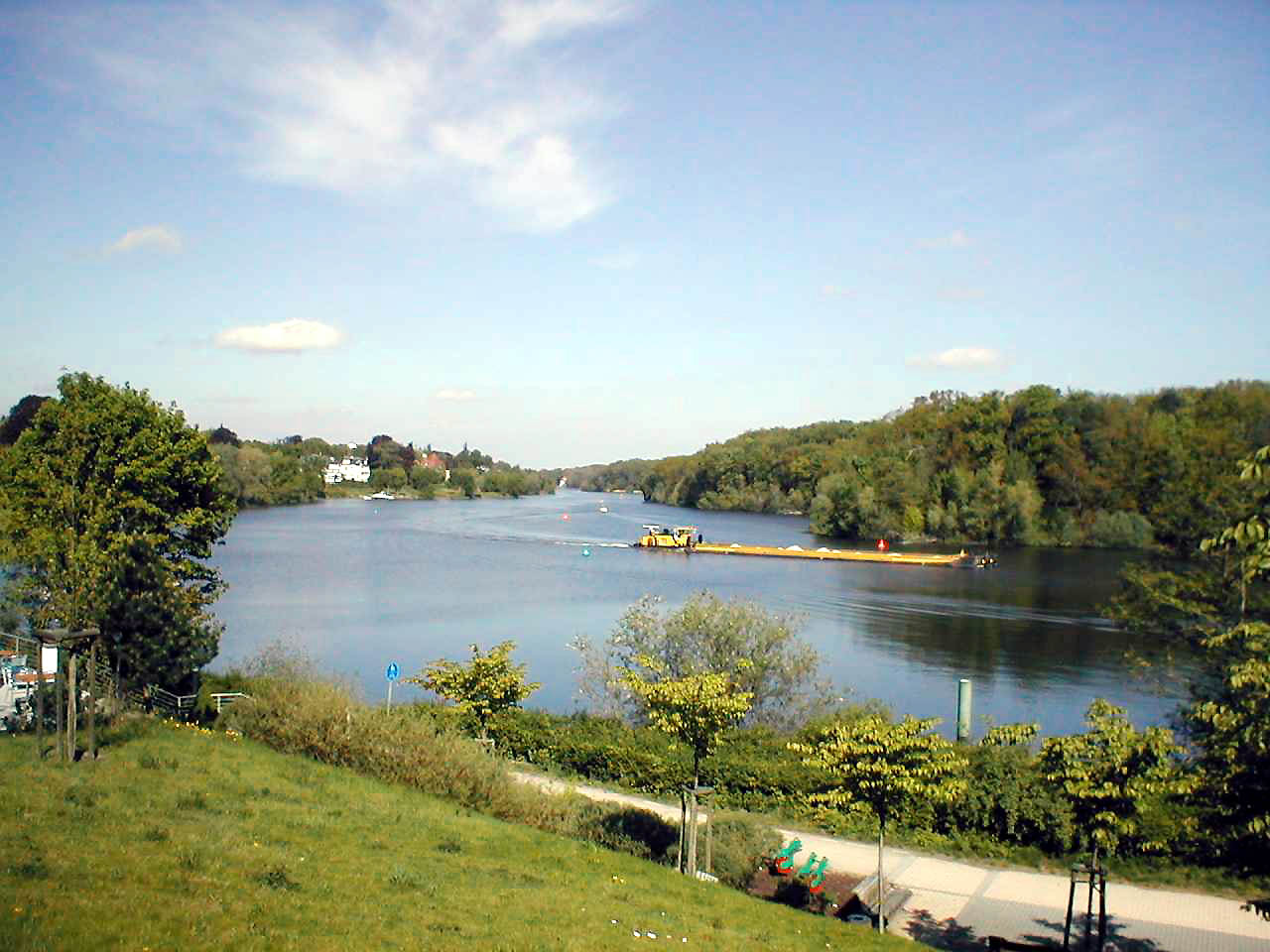 Links Potsdam-Babelsberg, rechts Berlin-Wannsee.